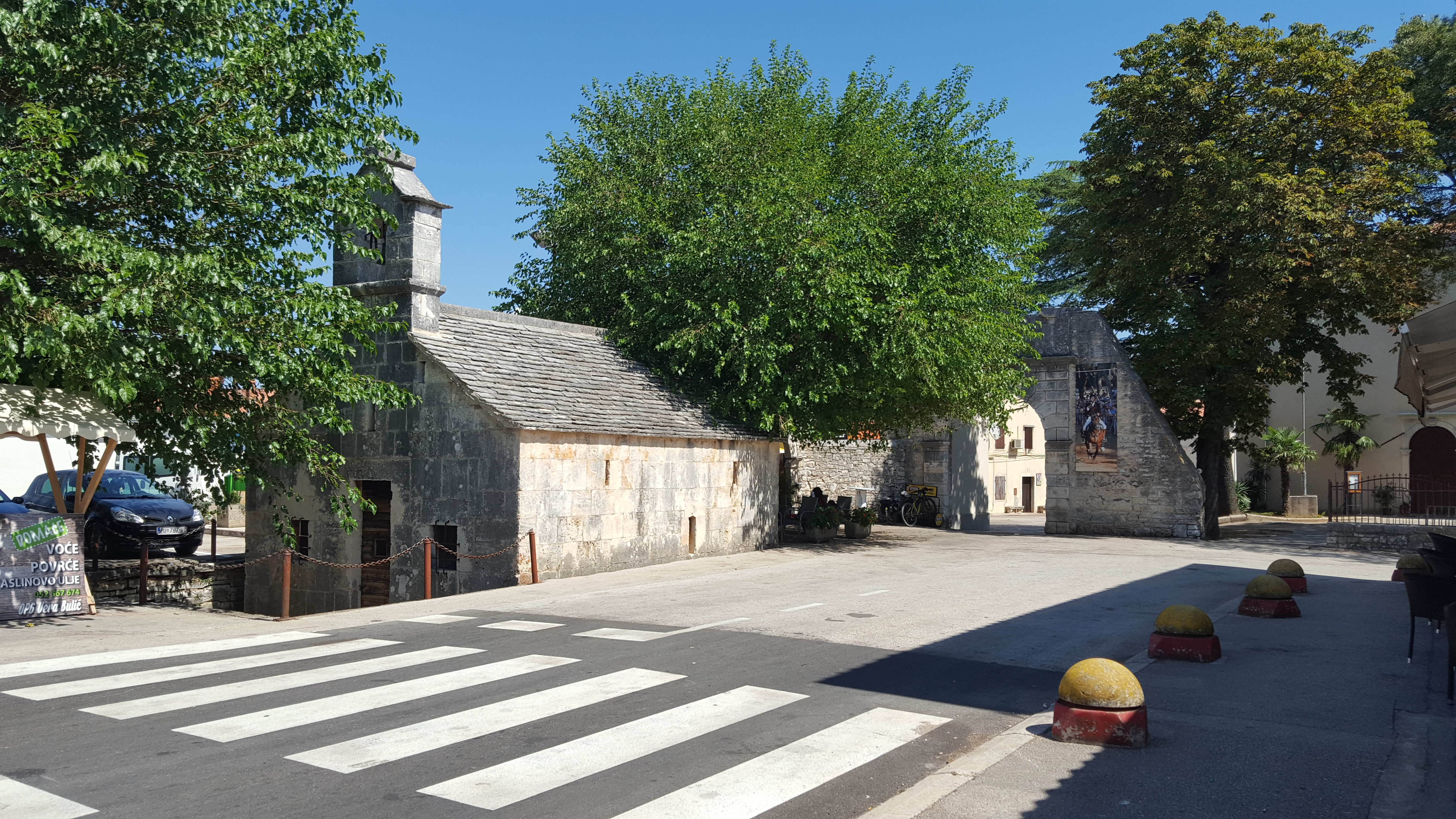 Barban, Antonius-Kirche